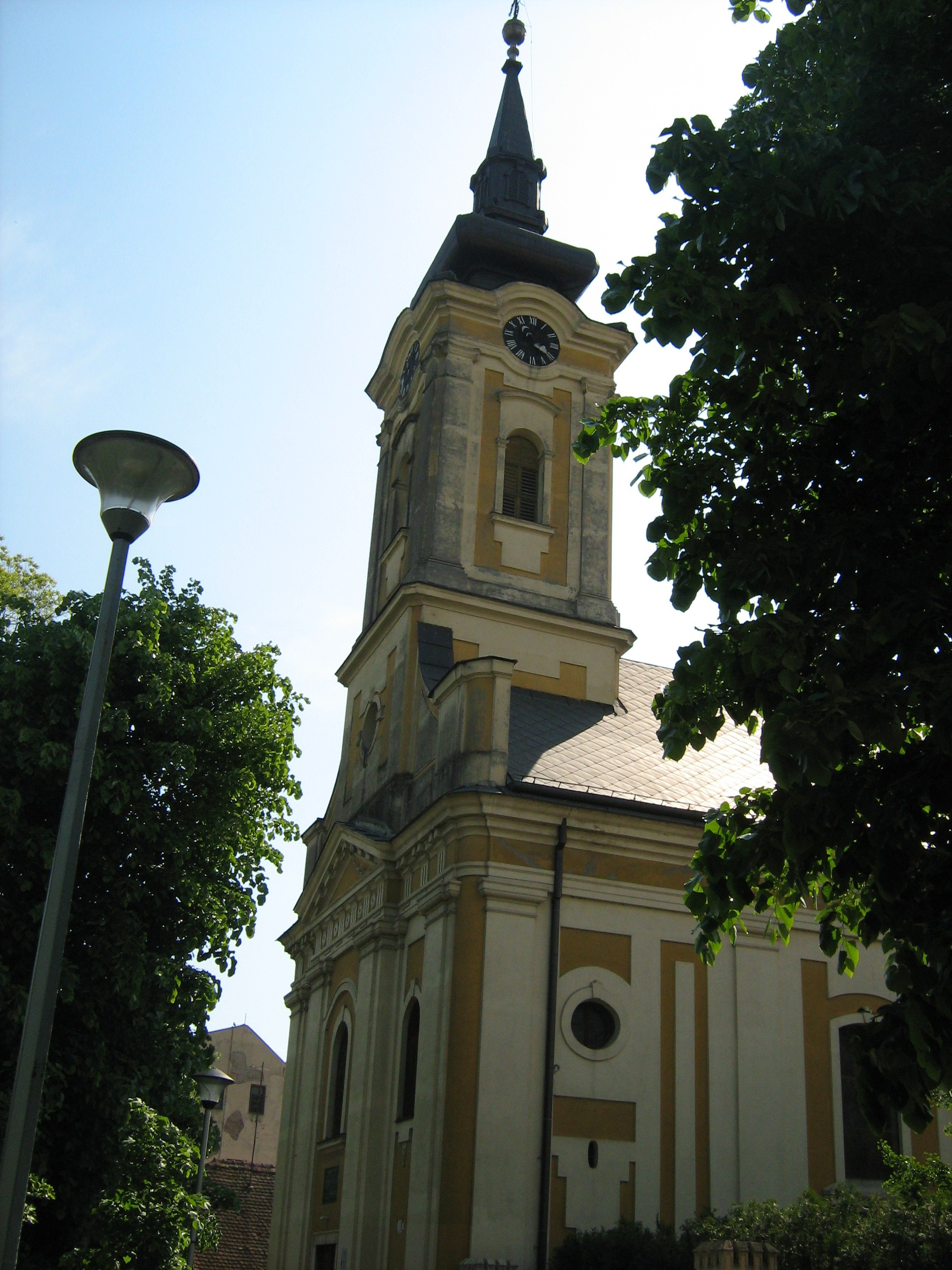 Римокатоличка црква Светог Димитрија, Сремска Митровица